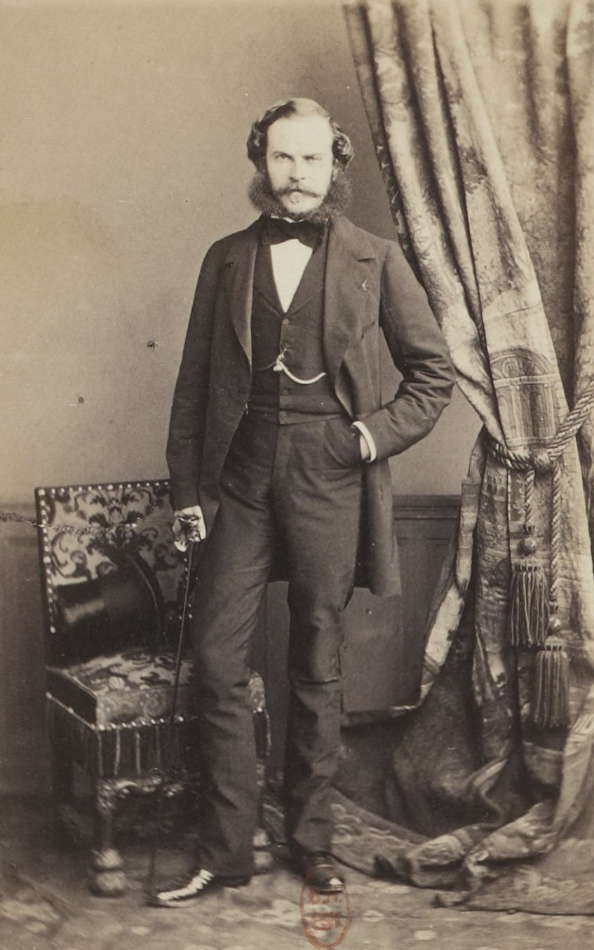 Album des députés au Corps législatif entre 1852-1857.